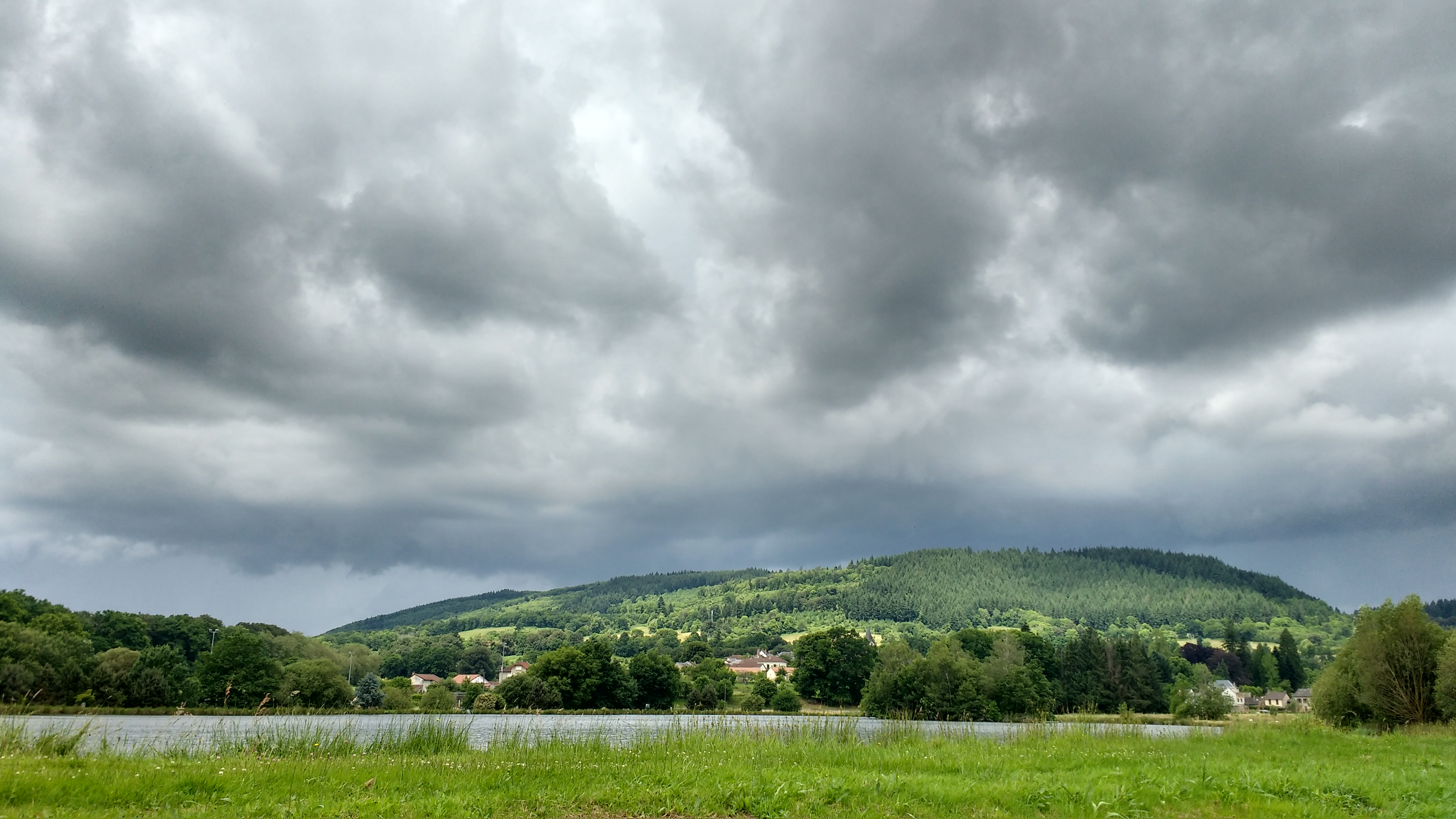 Vu des Monts d'Ambazac depuis la Jonchère Saint-Maurice prêt de l'étang. (Façade Sud Est)